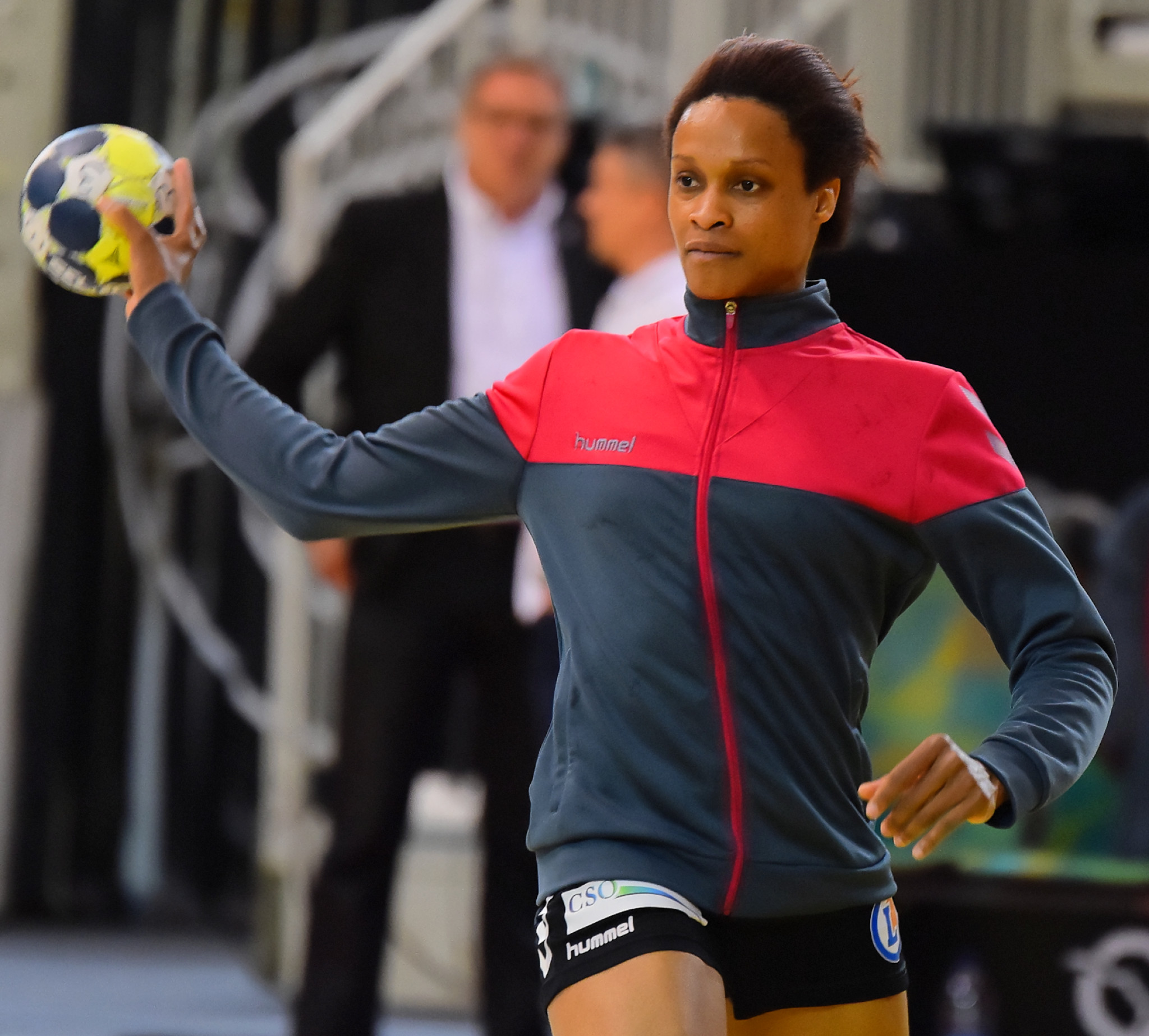 Rencontre de demie-finale retour de championnat entre Issy Paris et Brest. A Issy les Moulineaux, le 19 mai 2017.